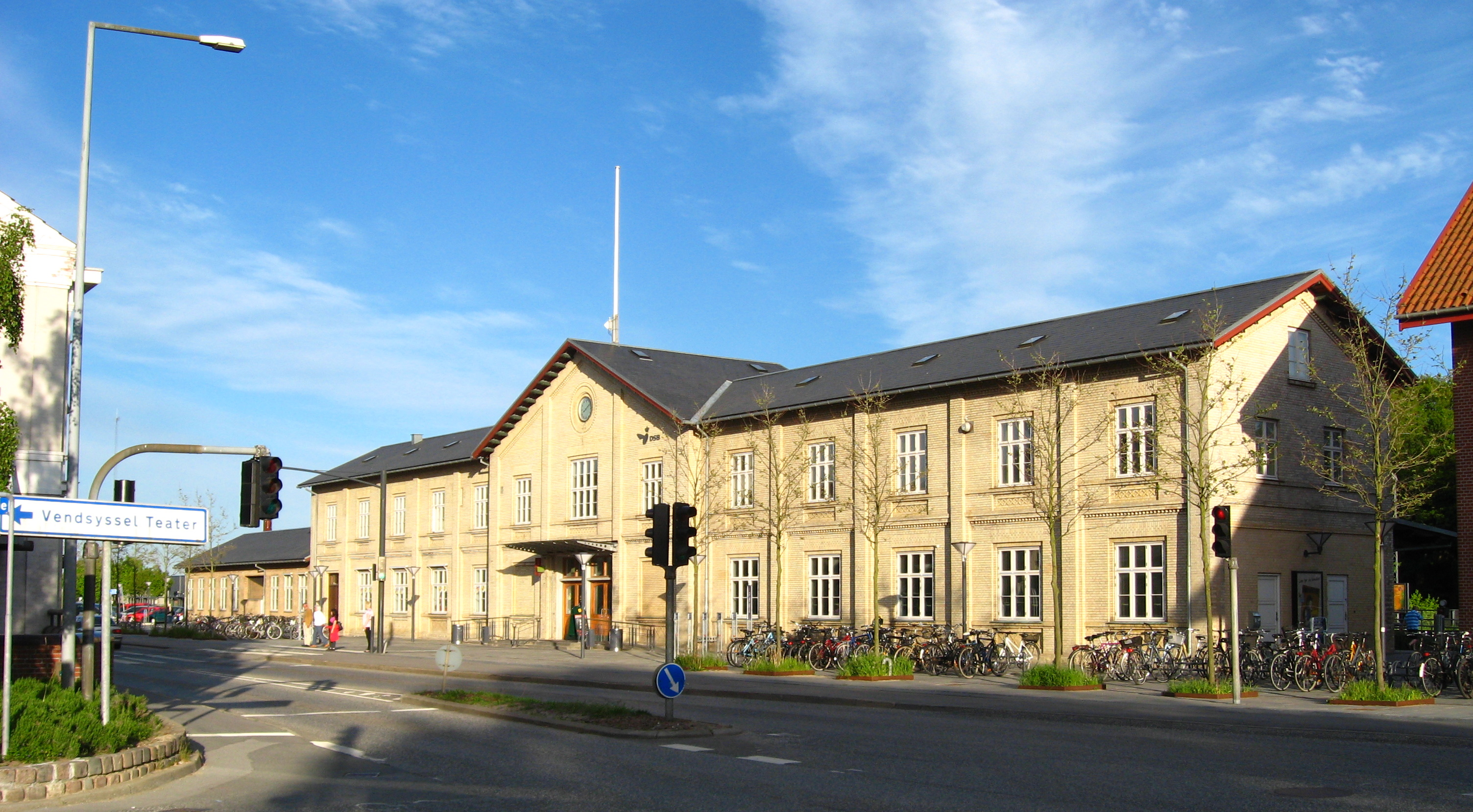 Hjørring banegård